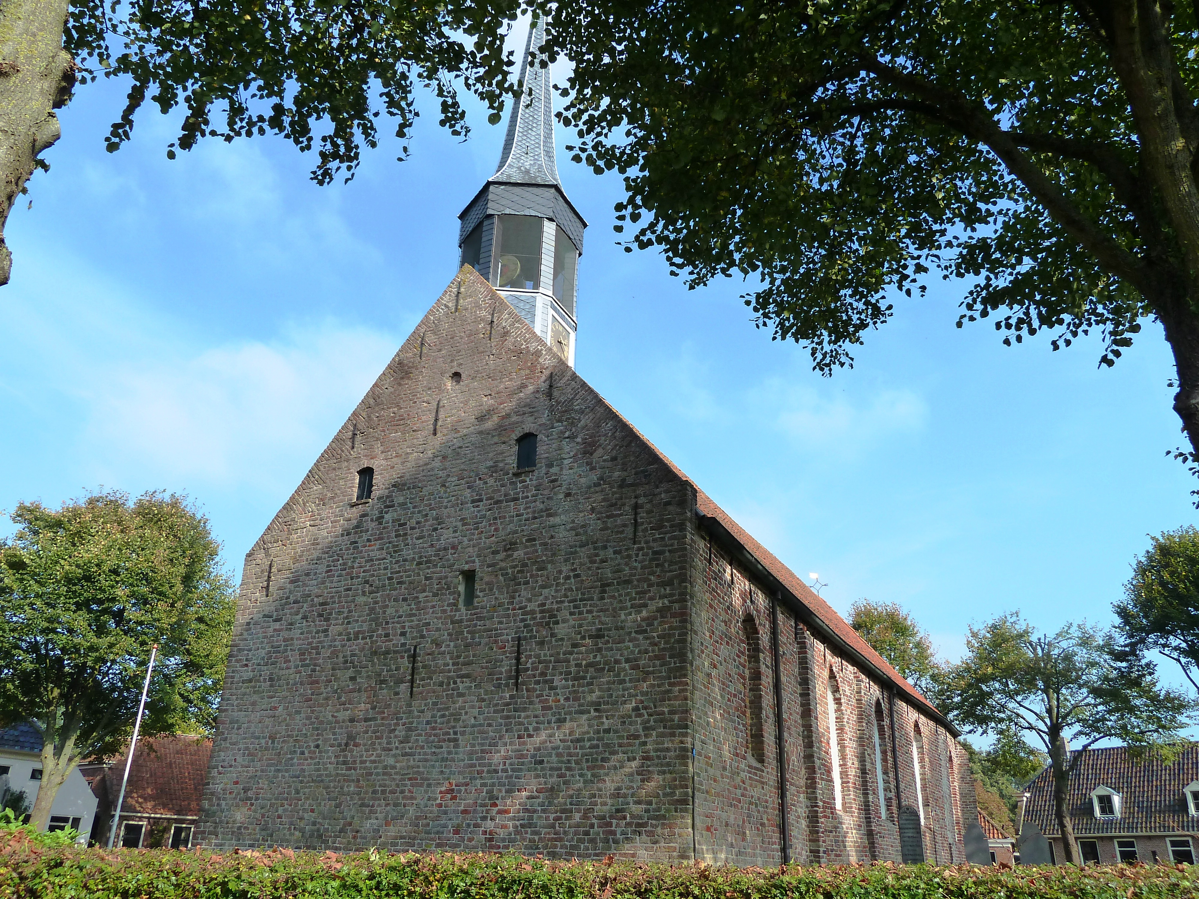 Noordzijde van de kerk van Niehove met de oorspronkelijke romaanse raamvensters.